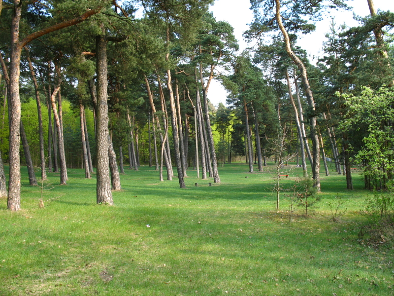 Pušynas Aukštojoje Panemunėje, Kaunas.